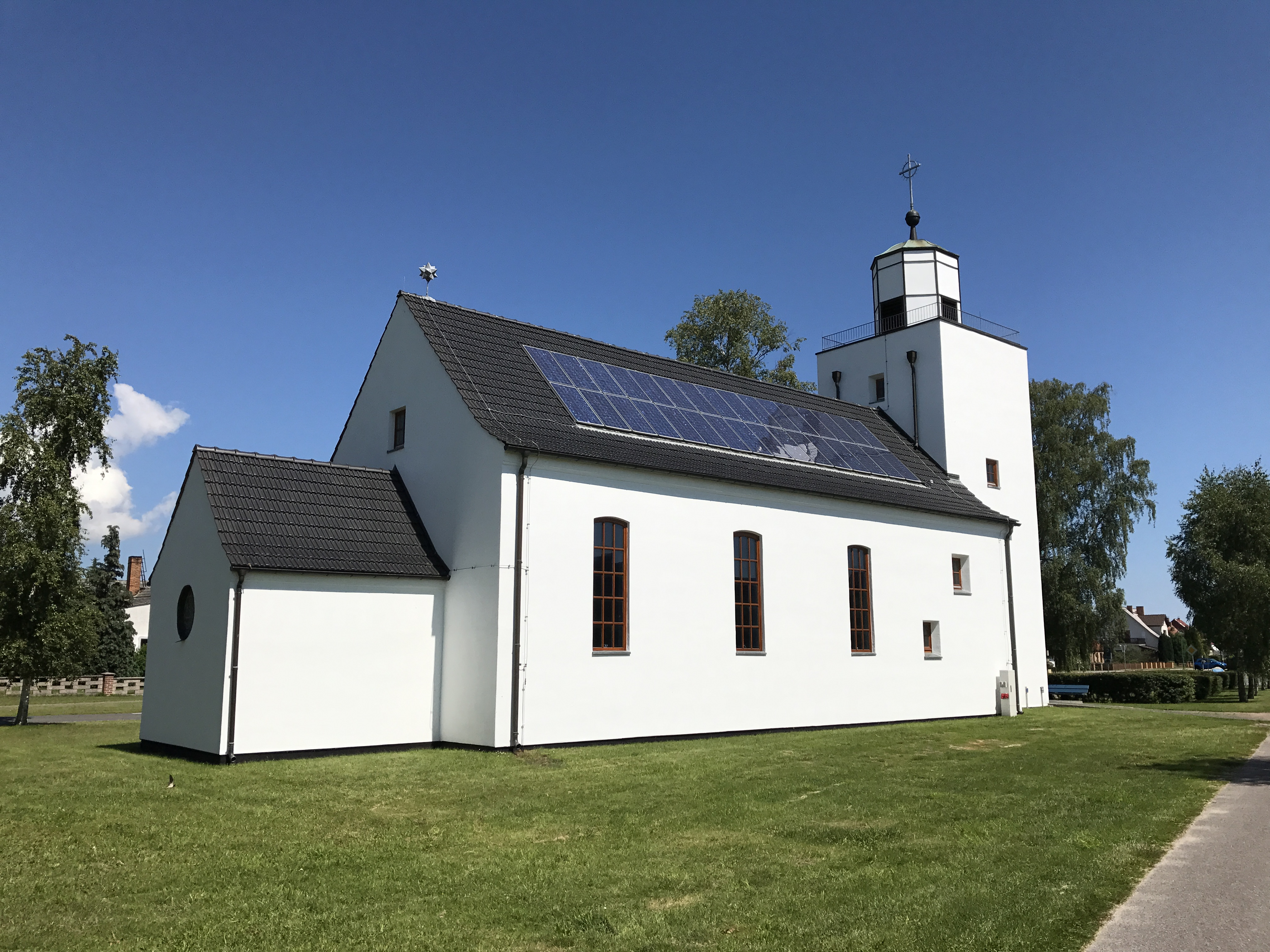 Die St. Petri-Kirche in Mönkebude ist eine Saalkirche aus den Jahren 1933 und 1934. In seinem Innern steht unter anderem ein kleines Altarkreuz, das H. Griese um 1960 bis 180 in Erfurt schuf.